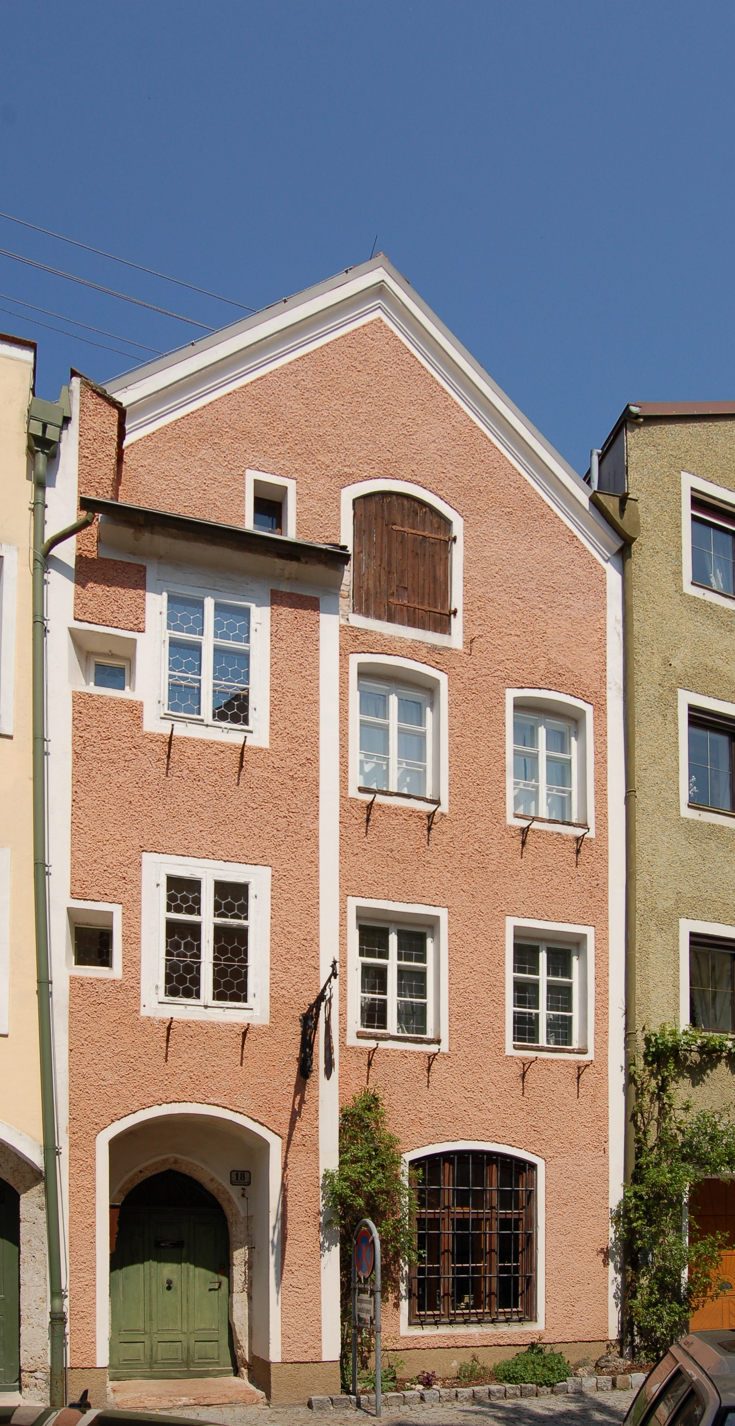 Das Bürgerhaus in der Johann-Fischer-Gasse Nr. 18 in Braunau am Inn (Oberösterreich).